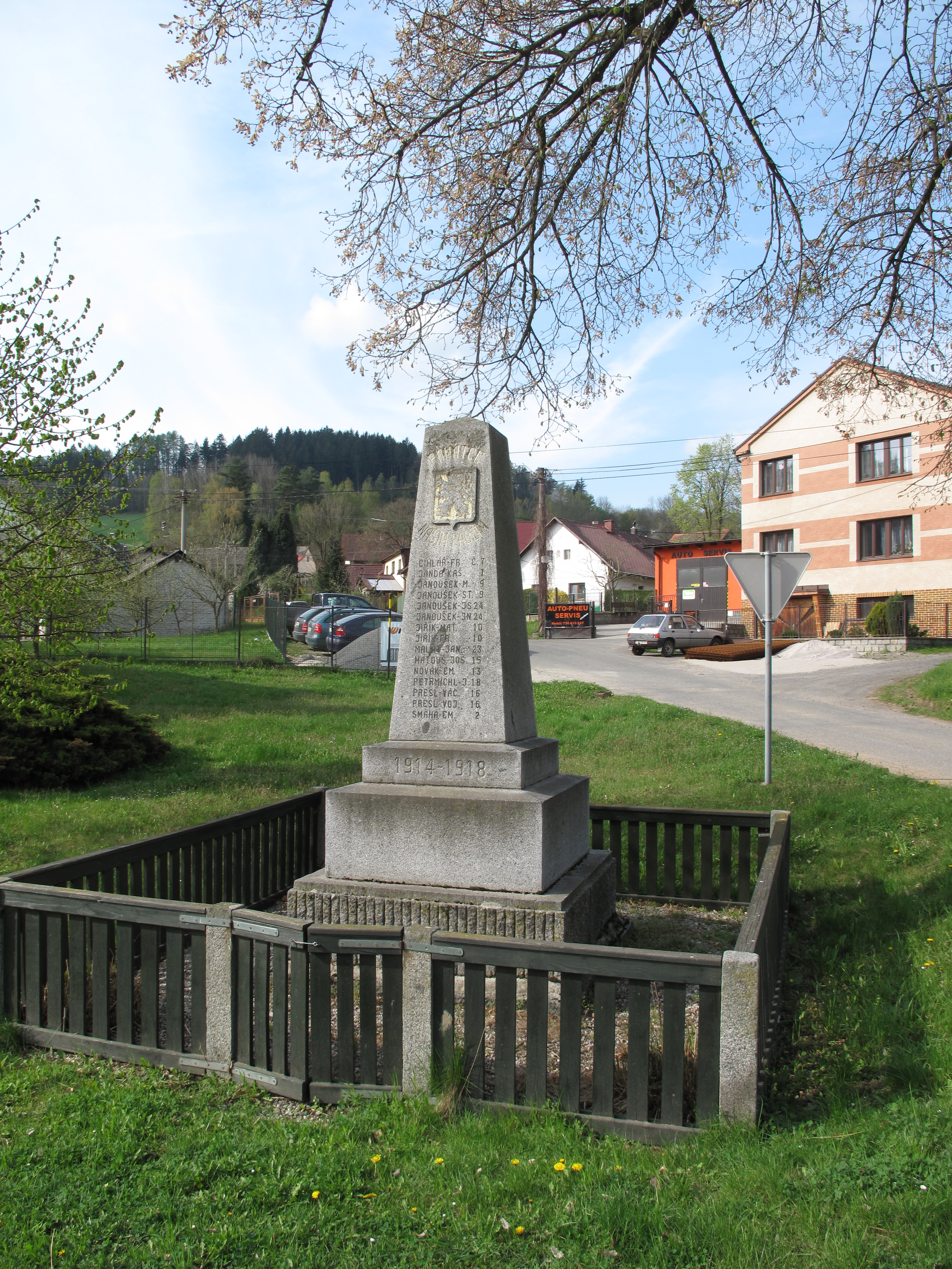 Kozí. Okres Klatovy, Česká republika.